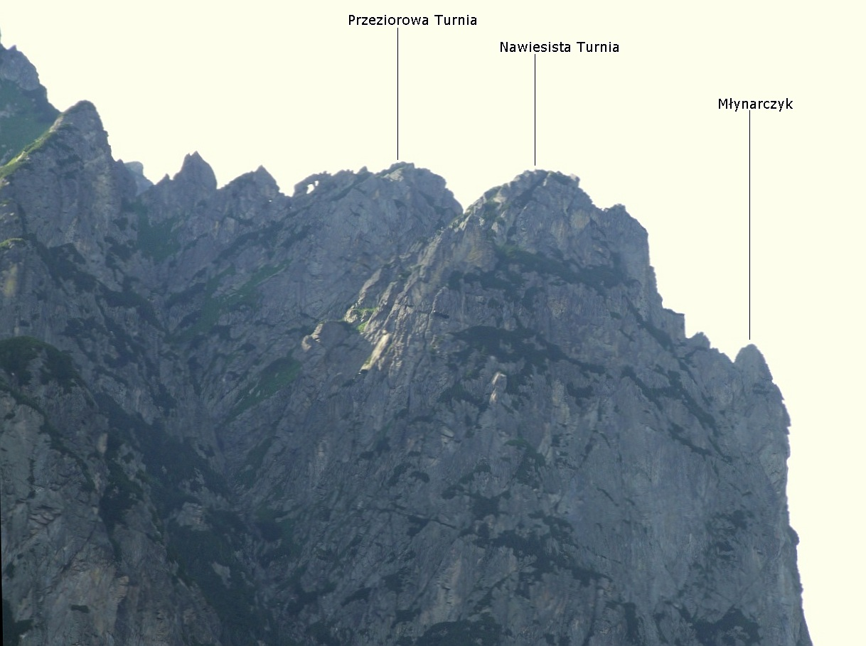 Grań wschodnia Młynarza, widok z Doliny Litworowej